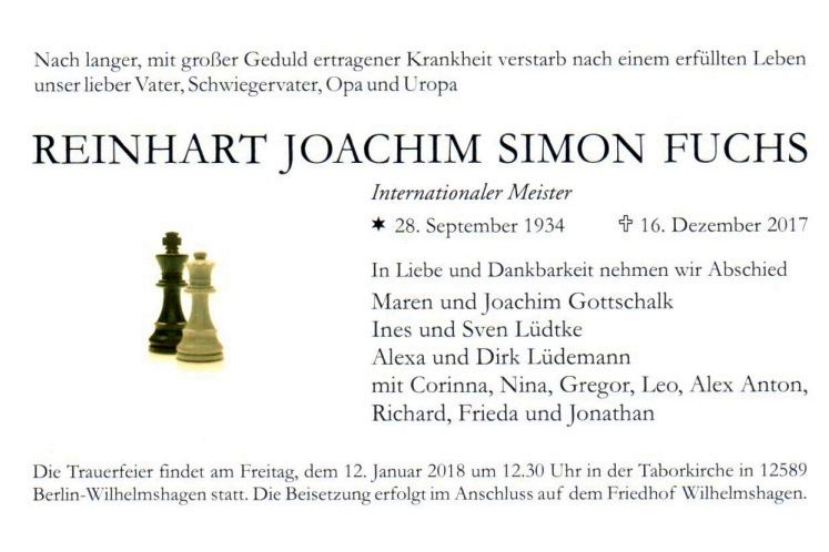 Todesanzeige Reinhart Joachim Simon Fuchs (* 28. September 1934; † 16. Dezember 2017) war ein deutscher Schachspieler und erhielt 1962 von der FIDE den Titel Internationaler Meister.